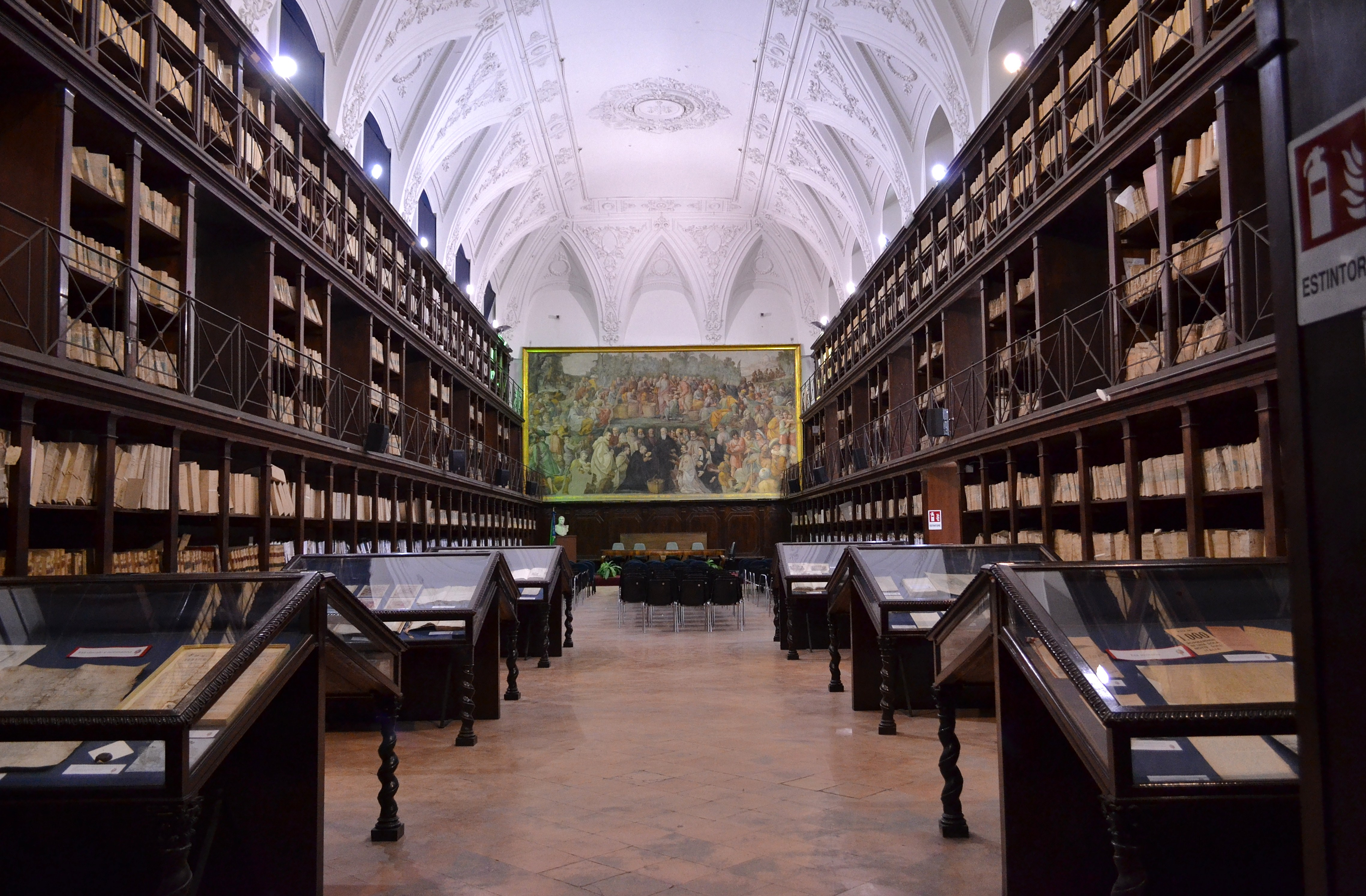 Monastero dei Santi Severino e Sossio di Napoli - Refettorio (sala Filangieri)